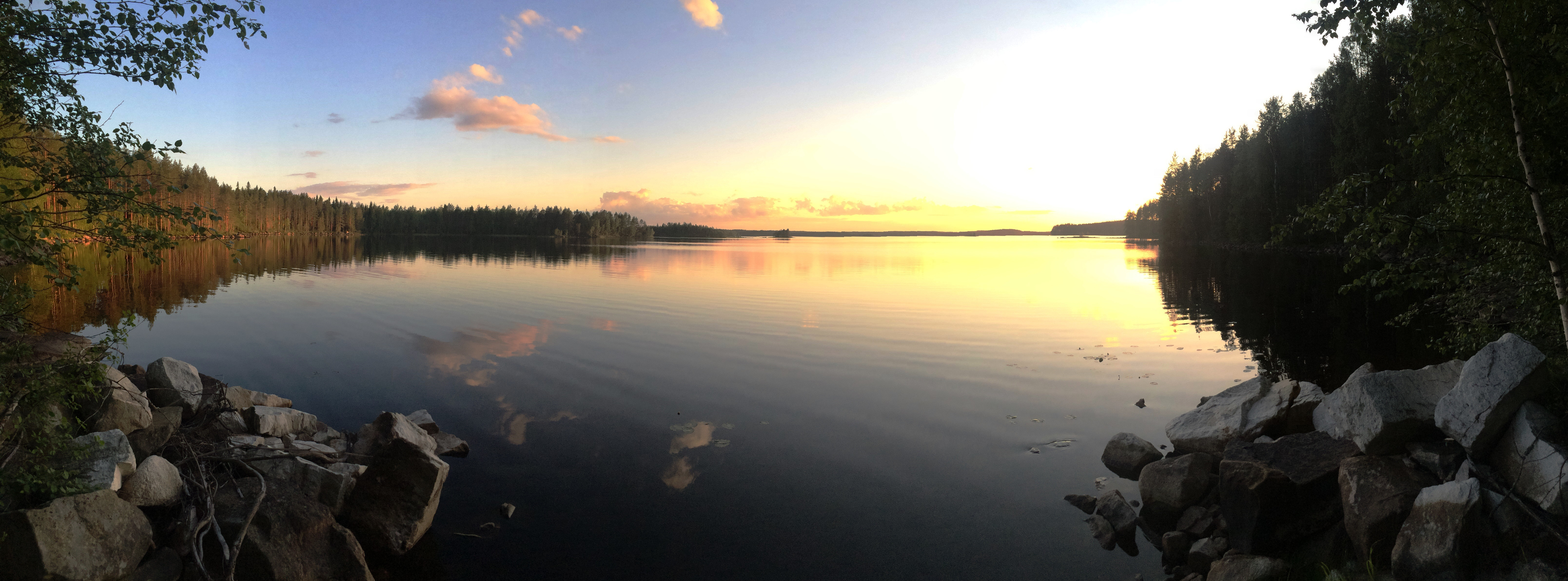 Вегарусъярви (озеро, исток Вегарусйоки)